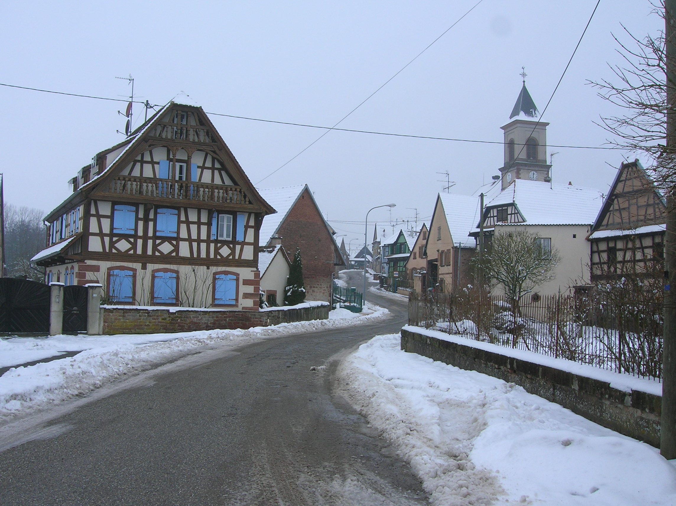 Nídermodere, Unterelsàss